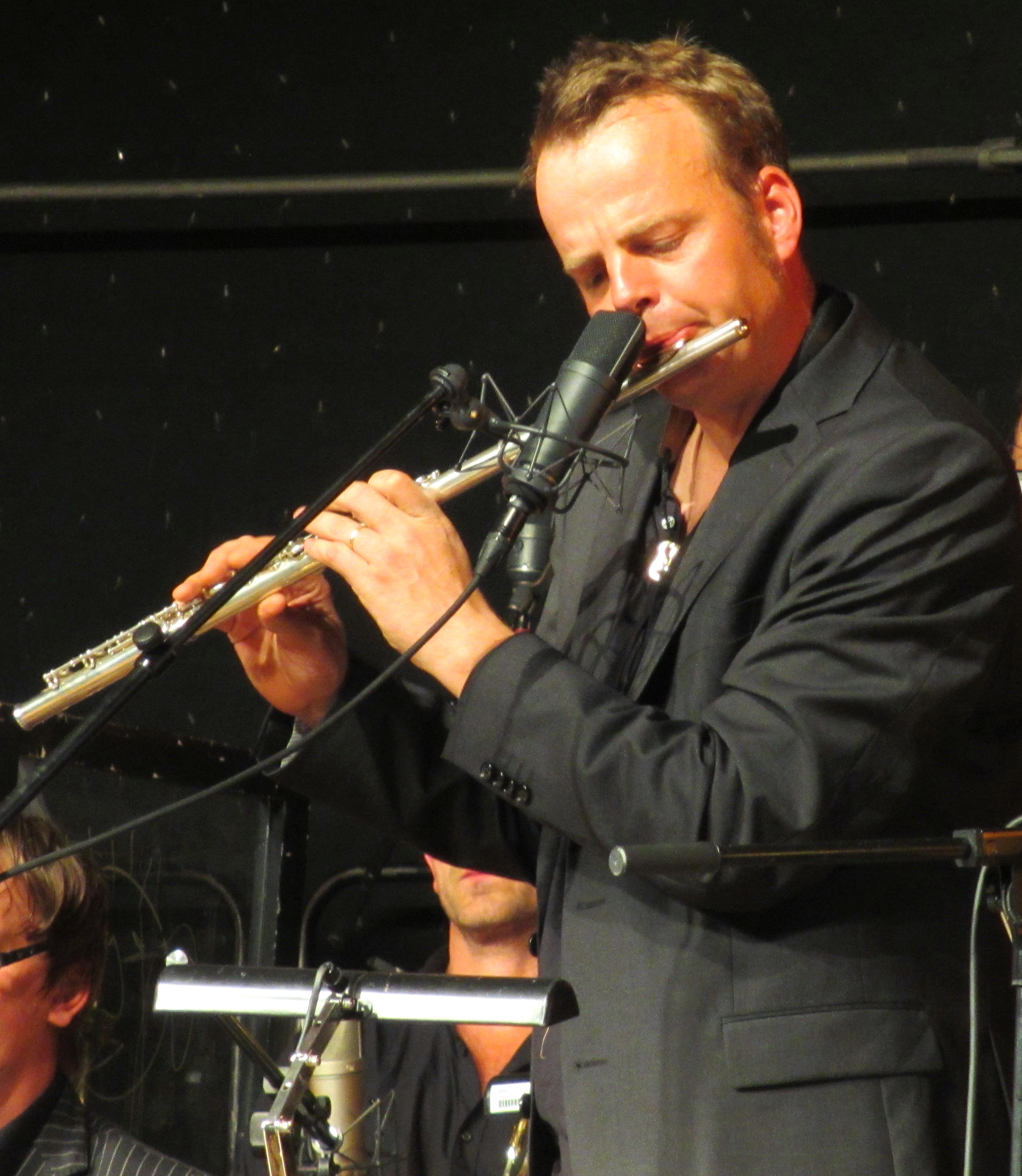 Fiete Felsch, deutscher Jazzmusiker, Mitglied der NDR Bigband, beim Konzert der NDR Bigband mit Stefan Gwildis am 1. Juni 2013 im Schuppen 6 in Lübeck